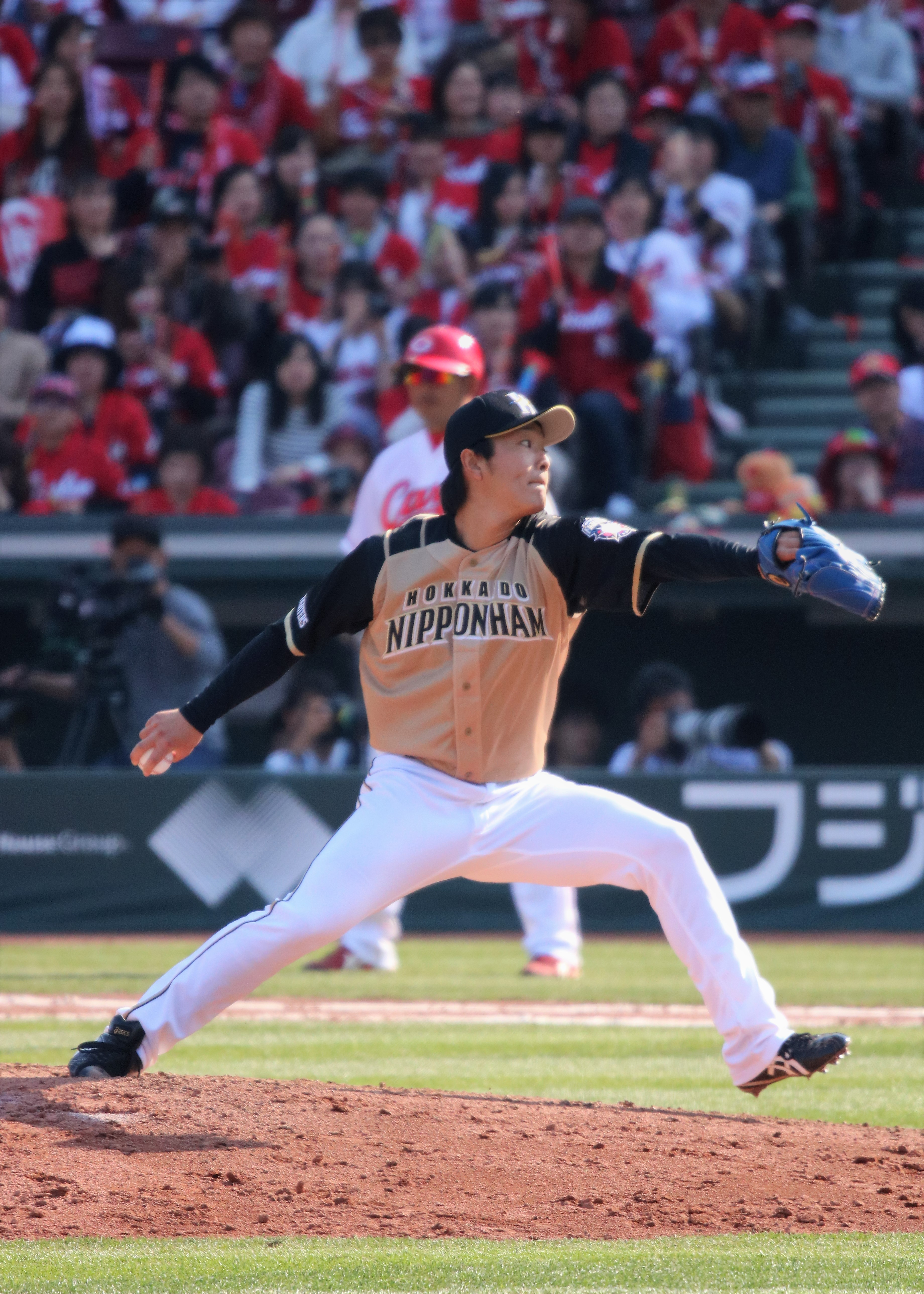 2018/3/14マツダスタジアム